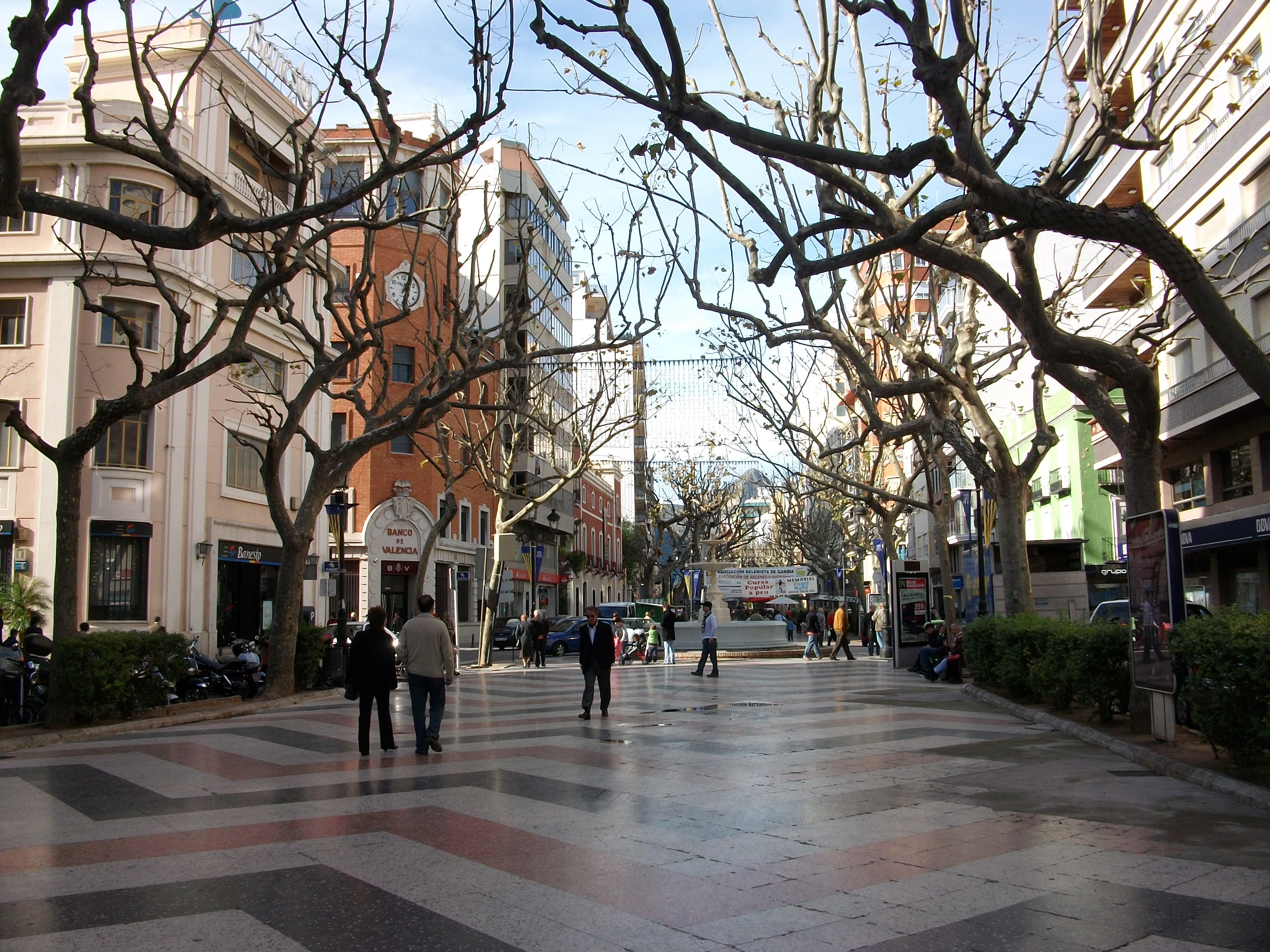 Passeig de les Germanies de Gandia.